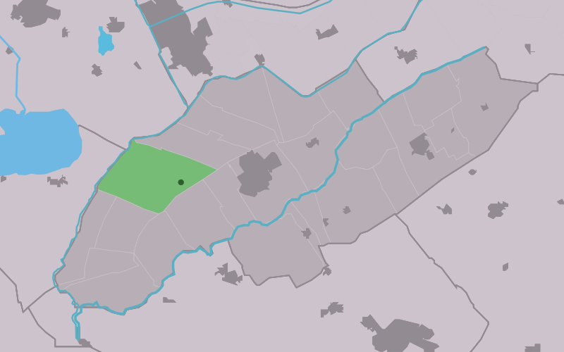 Kaartsje fan himrik fan Aldlemmer